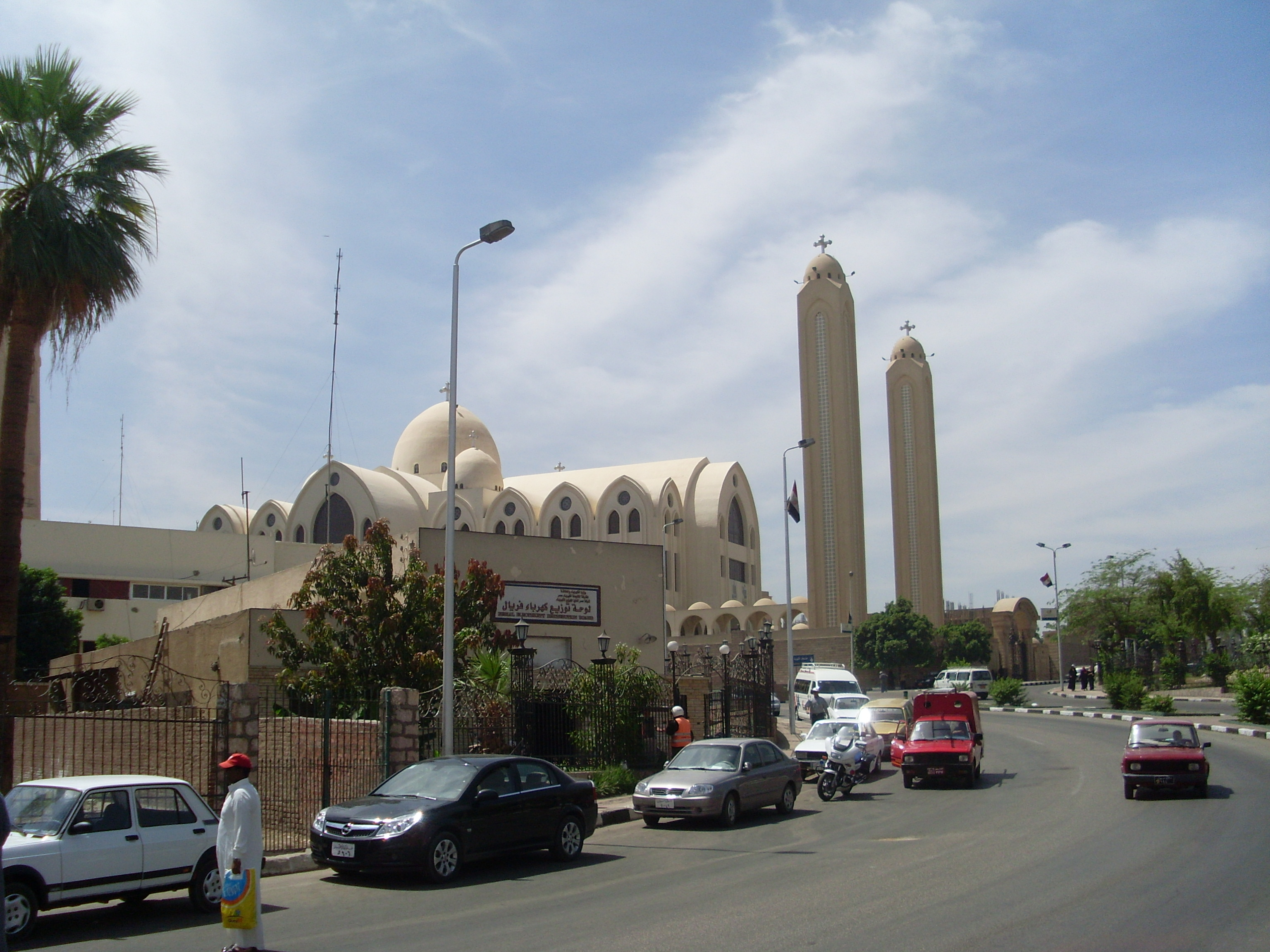 Iglesia copta de Asuán, arcángel Miguel, Egipto, abril de 2009